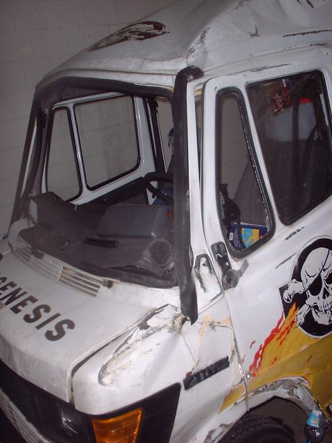 Pyogenesis Bandbus